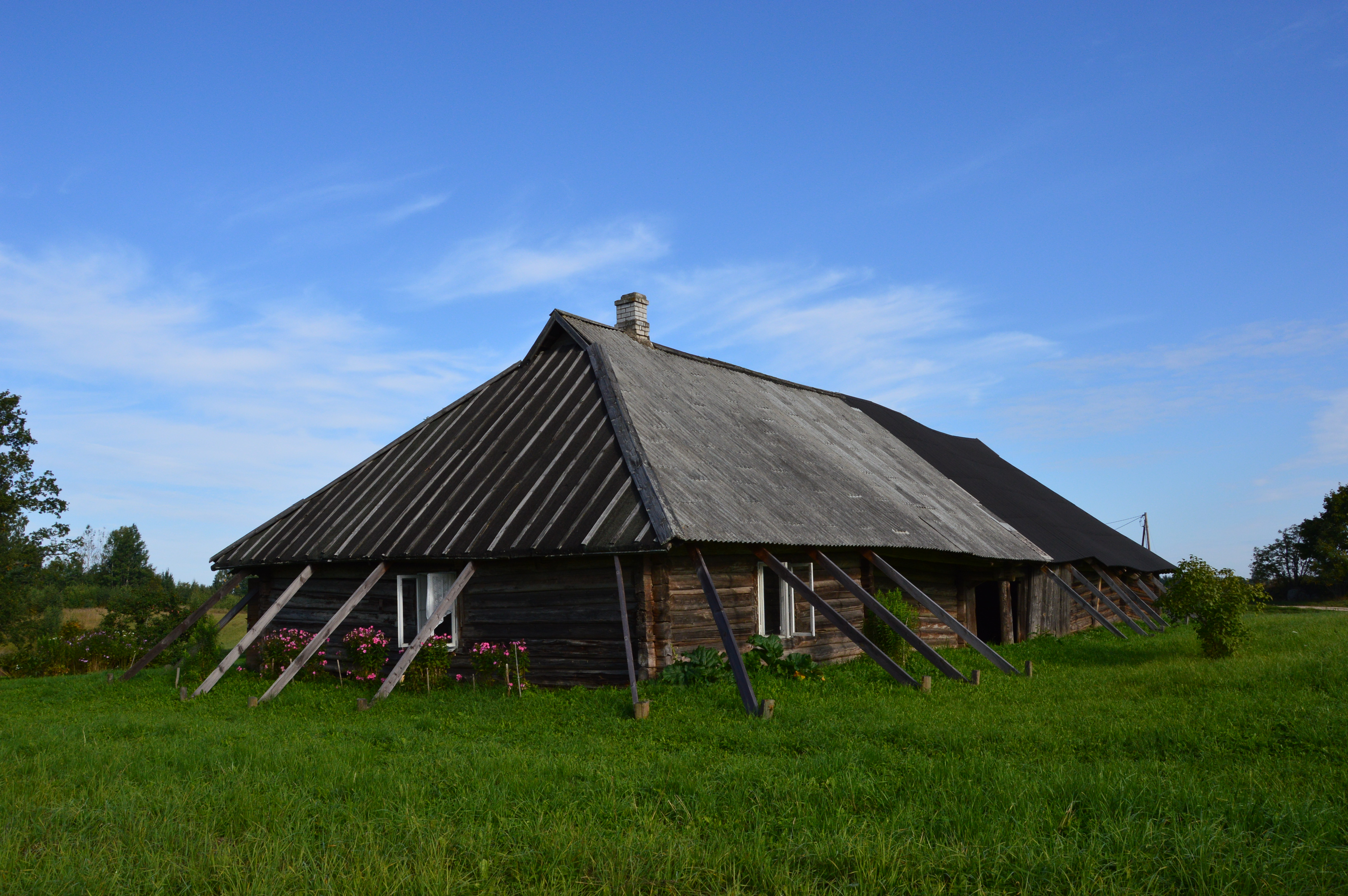 Hinni talu rehielamu